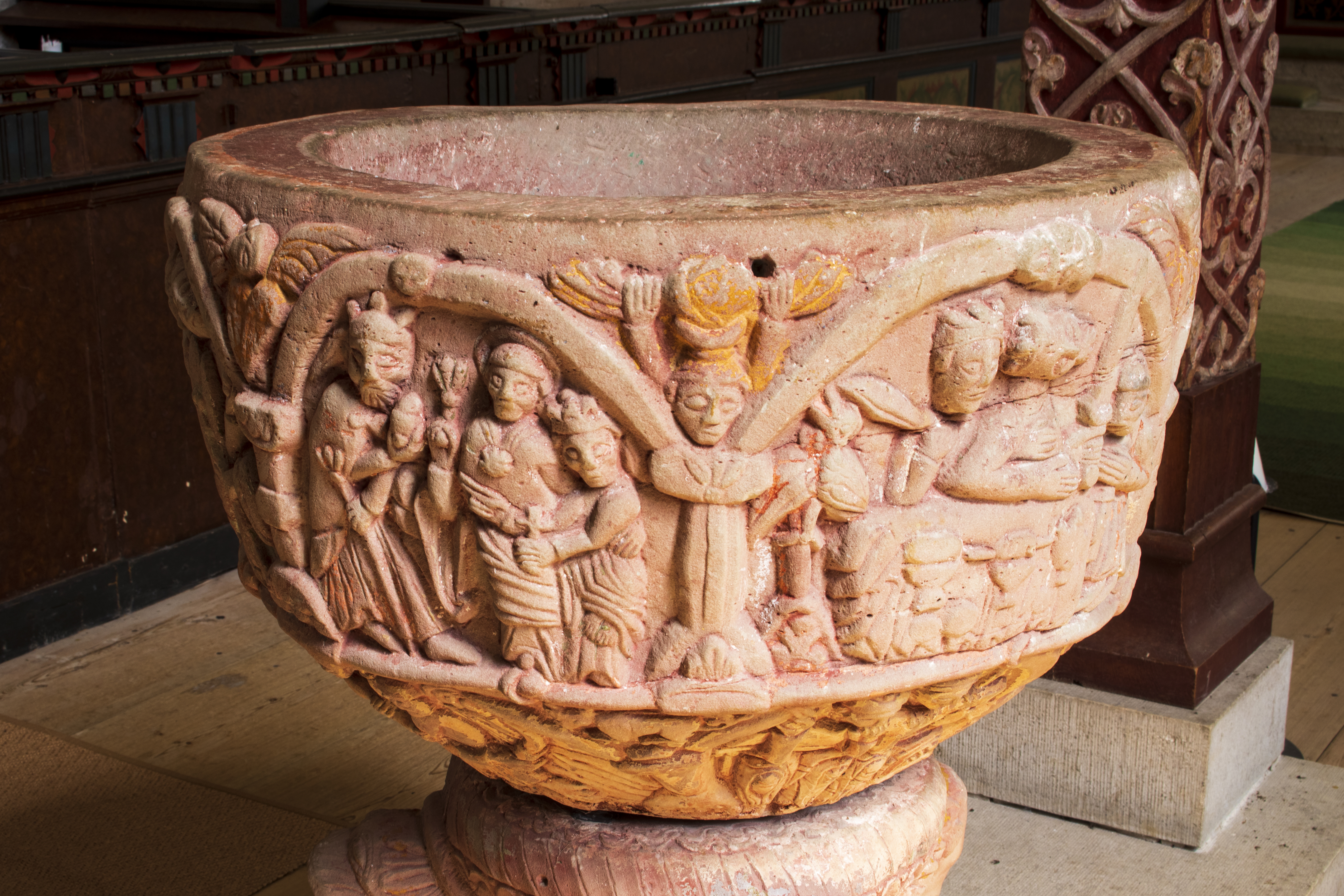 Detalle da pía bautismal da igrexa de Stånga, na illa sueca de Gotland.